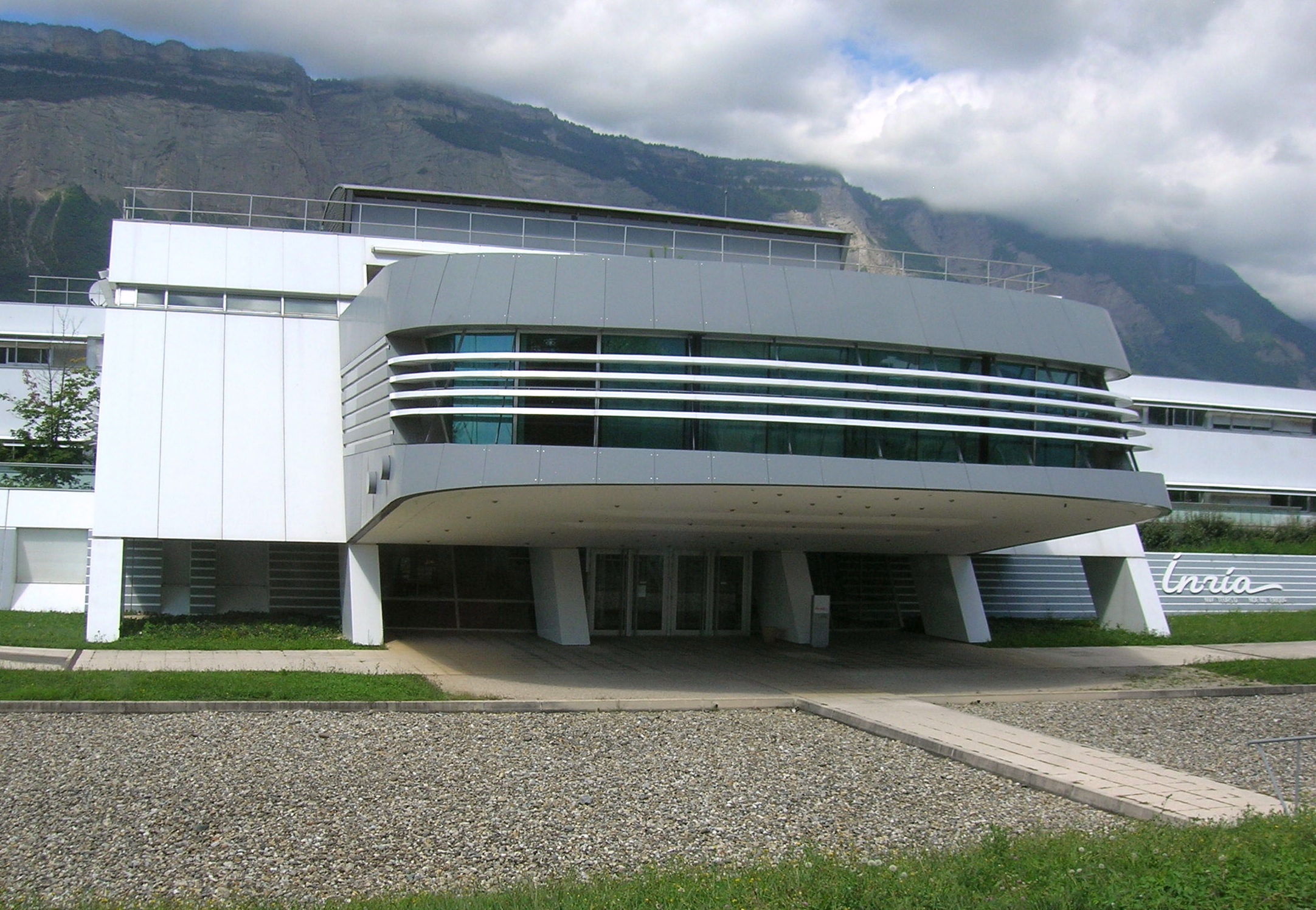 Inria, Innovallé. Montbonnot-Saint-Martin, Isère, AuRA, France.